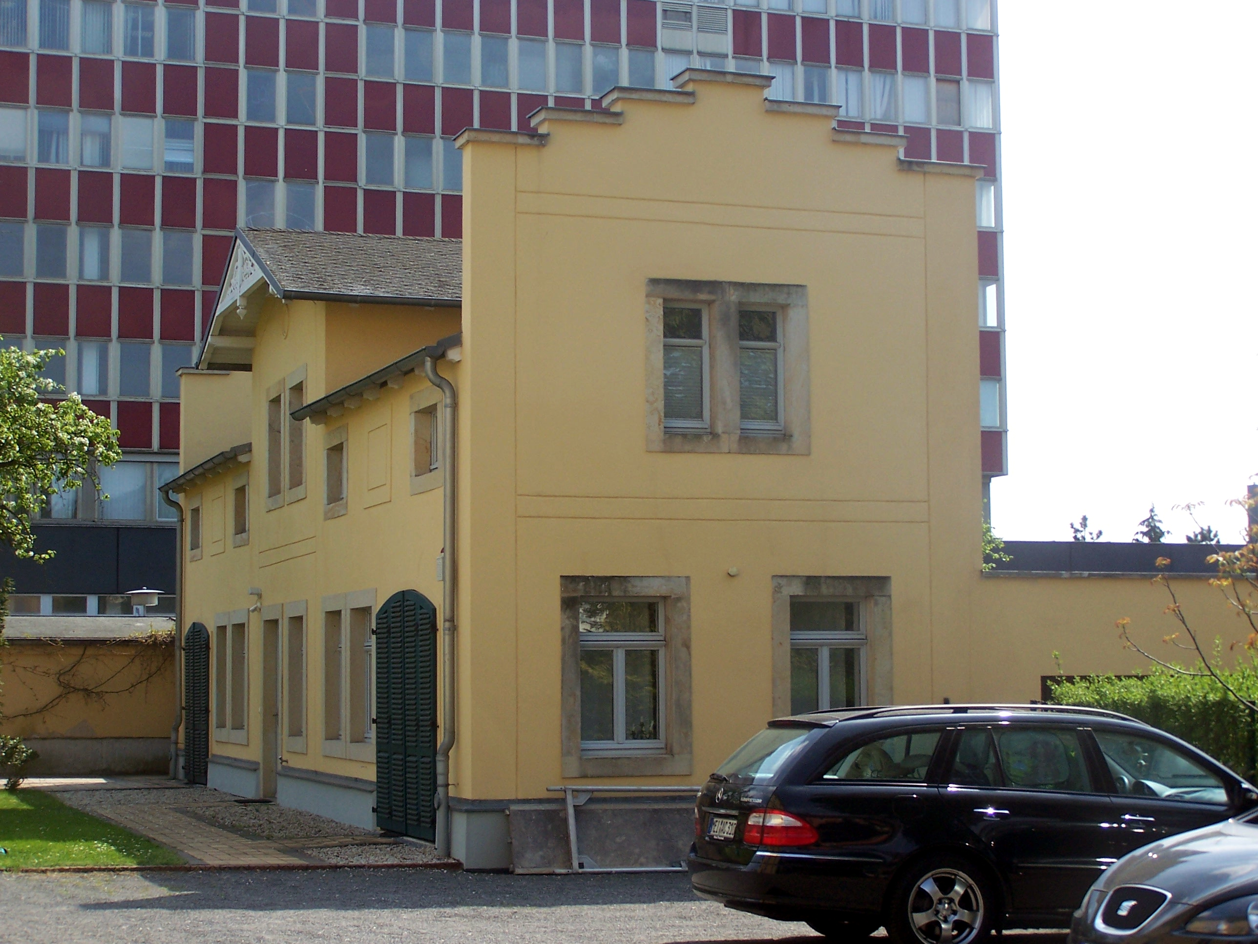 Nebengebäude zur Villa Goethestraße 1 (Villa Charlotte) in Radebeul